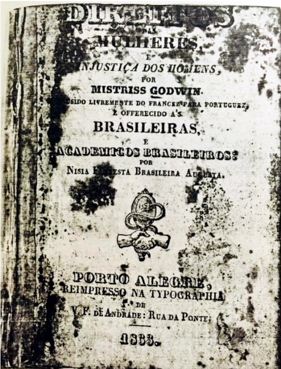 Capa de Direitos das mulheres e injustiças dos homens, 2ª edição